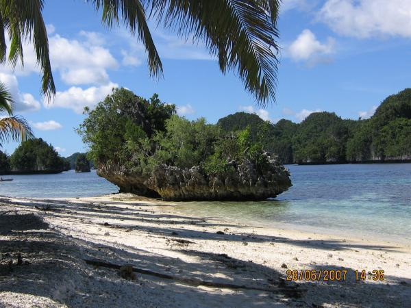 Pangabangan